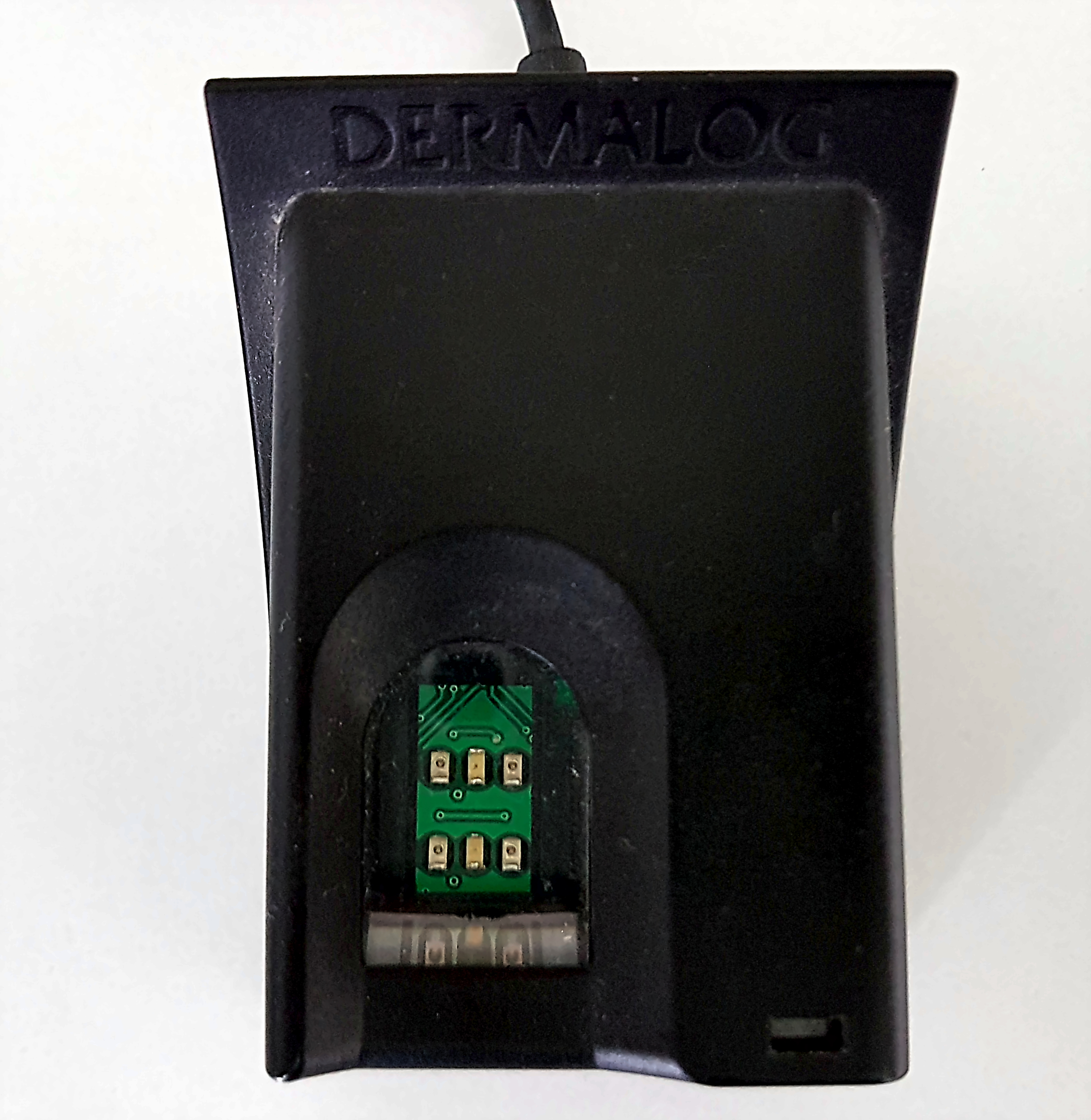 Optischer Fingerabdrucksensor, mit dem die Lebenderkennung gewährleistet ist und der zwischen nassen und trockenen Fingern unterscheiden kann